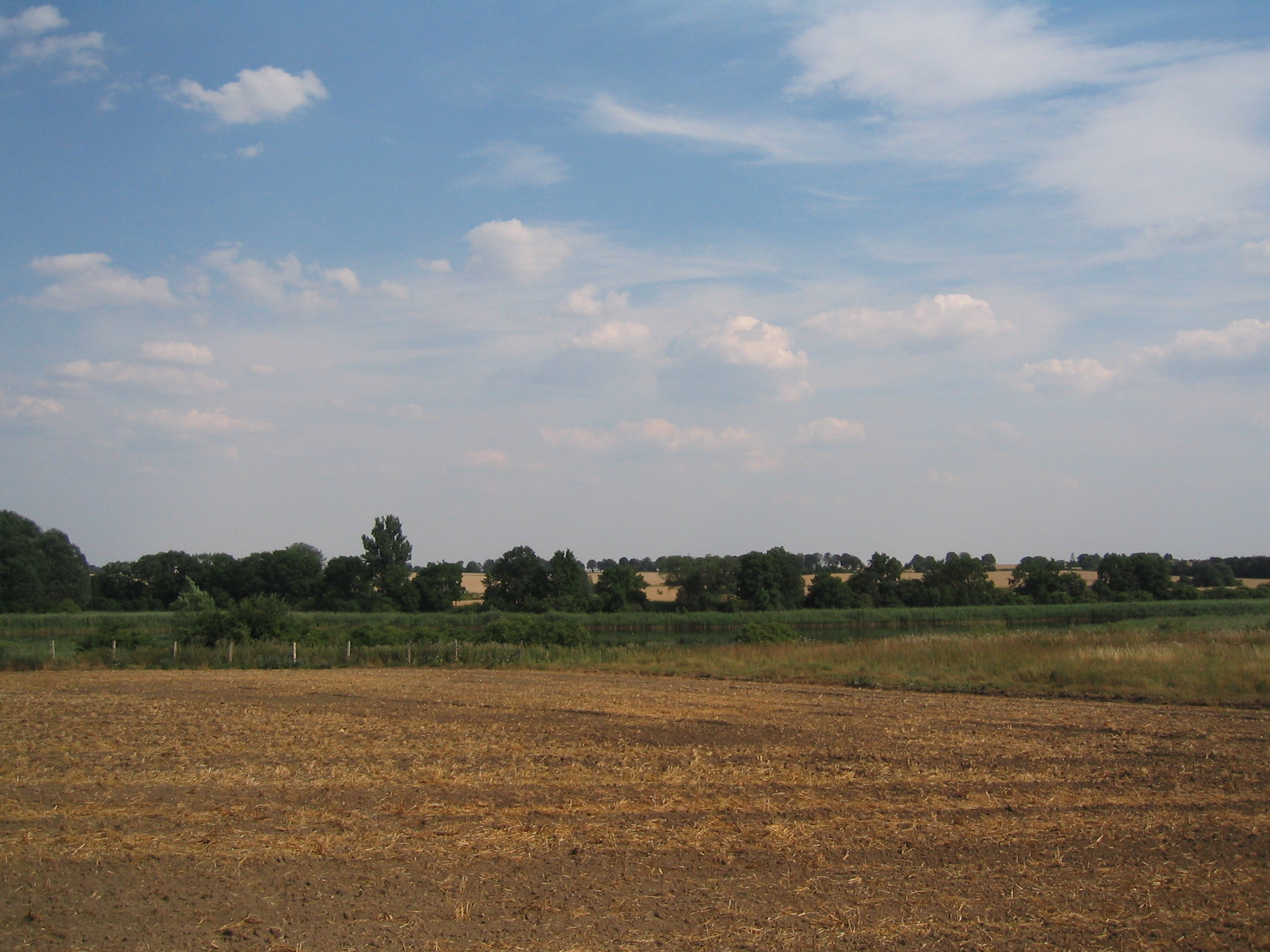 Wollenthinsee in Bündigershof und Wollenthin. See unzugänglich.